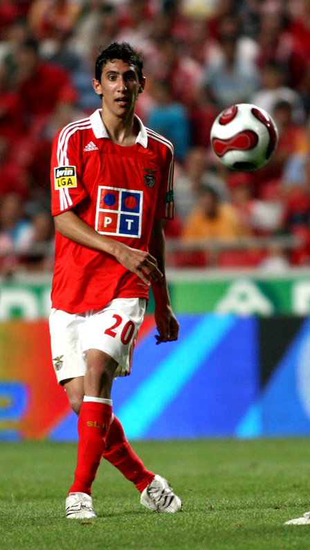 Ángel Di María, 15. September 2007, Benfica vs. Naval